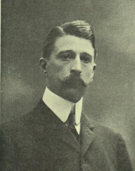 Alberto Rusiñol, por Christian Franzen.